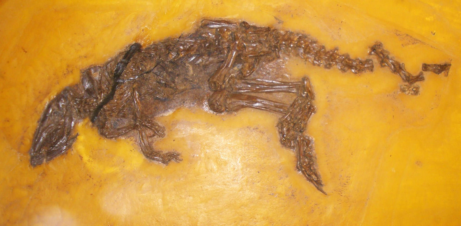 Fossil of Leptictidium, an extinct mammal- Took the photo at Senckenberg Museum of Frankfurt